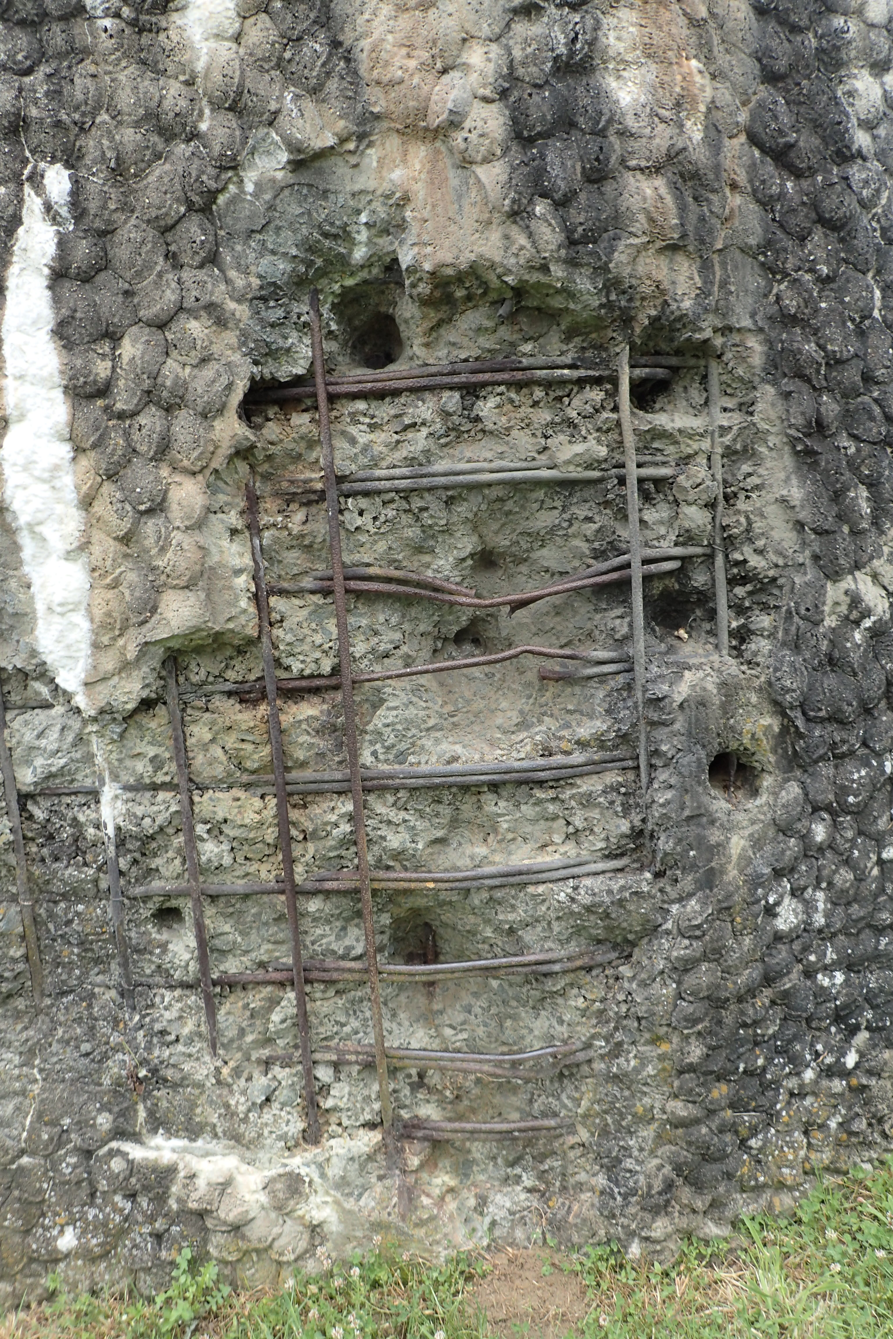 Bunker Ni9 - Lange Kamstraat - hoek Molenveldstraat